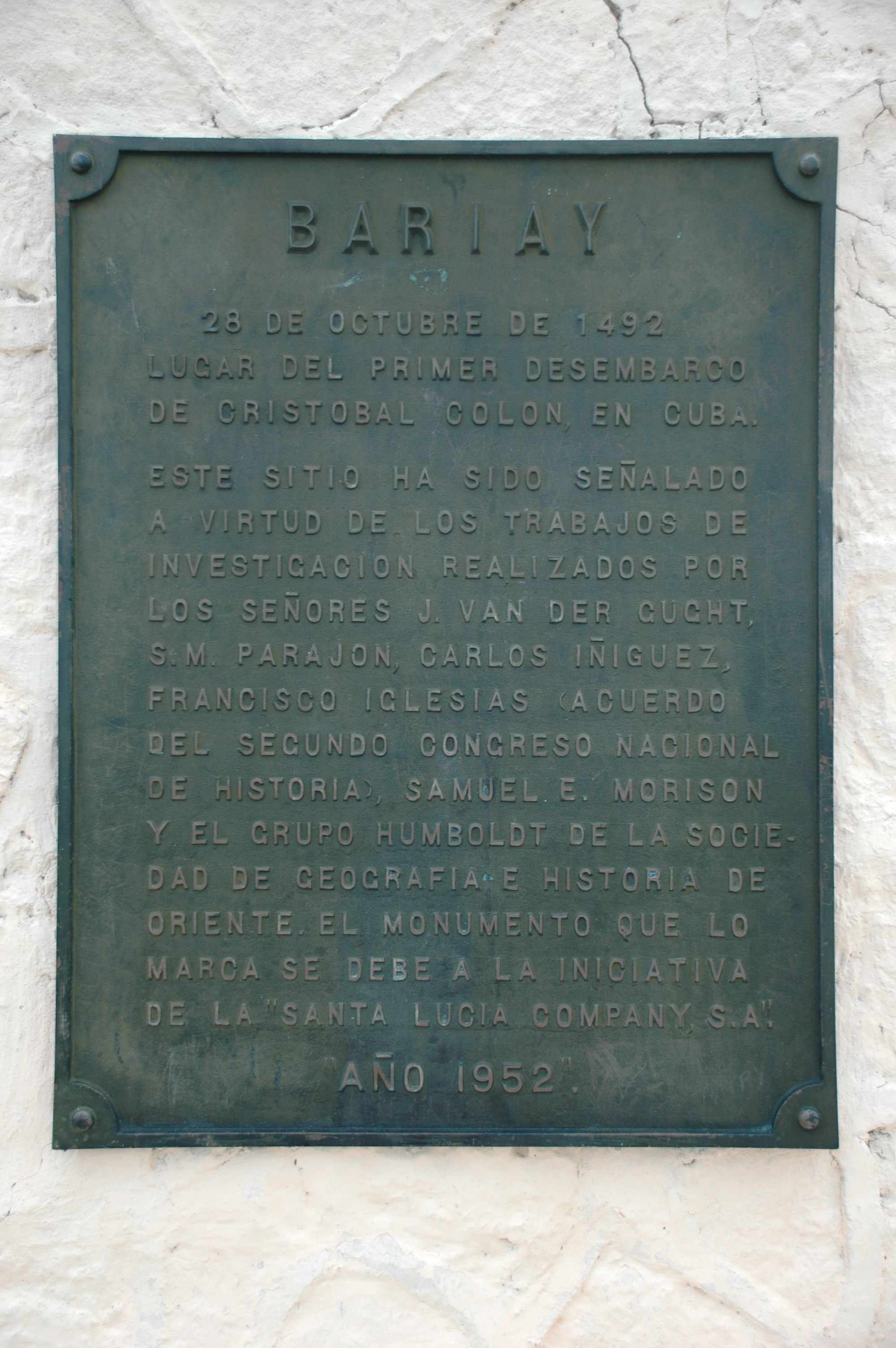 Tarja de referencia y descripción de la investigación del grupo Humboldt.